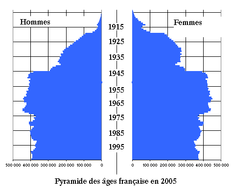 Pyramide des âges en France en 2005